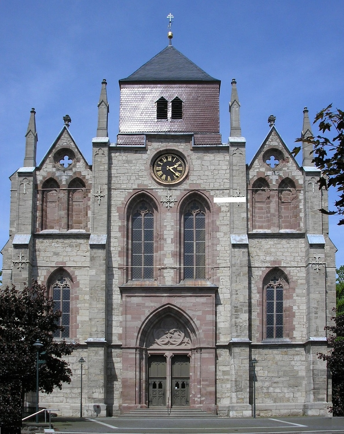 Dingelstädt, kath. Pfarrkirche St. Gertrud